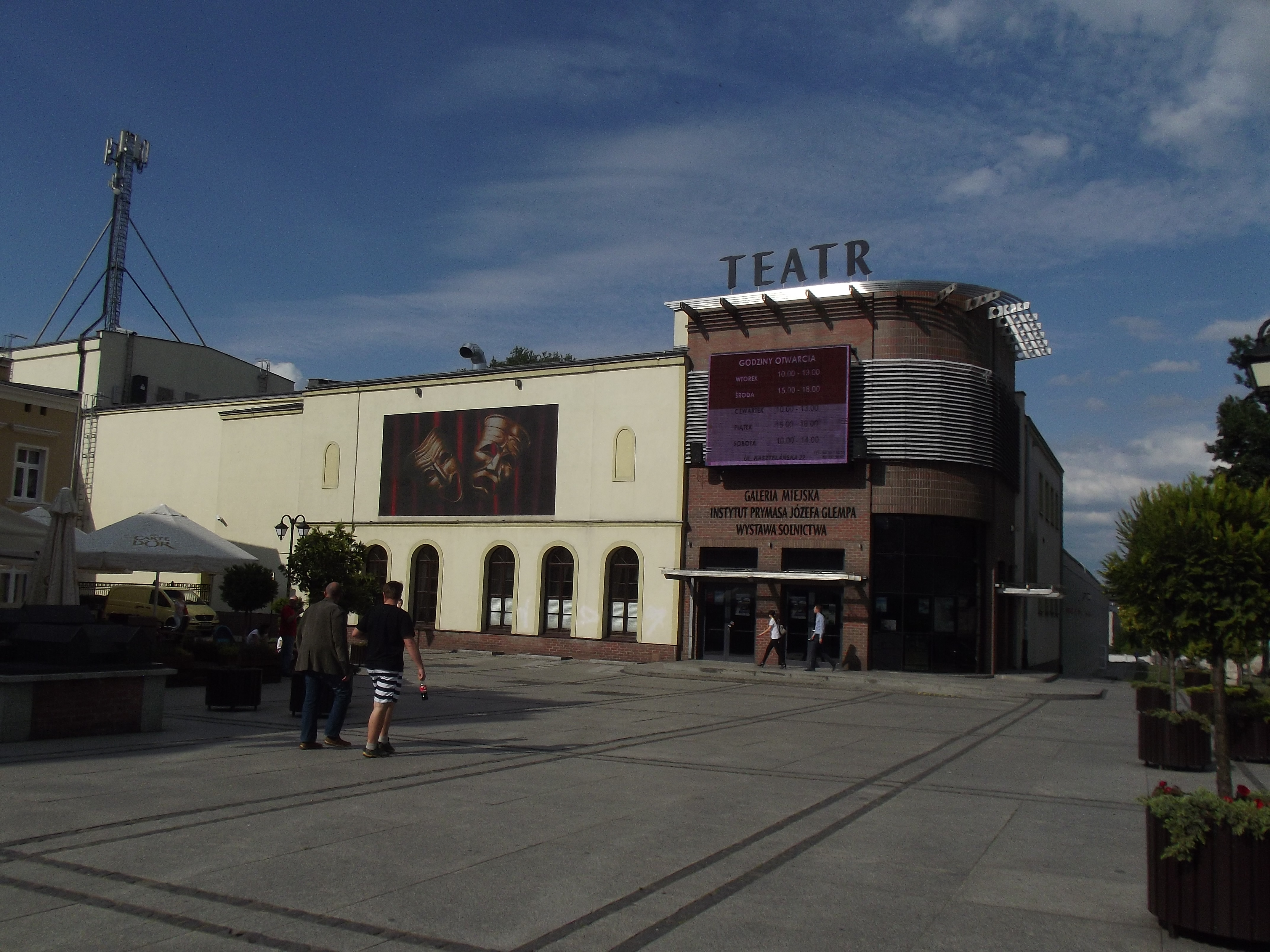 Teatr w Inowrocławiu